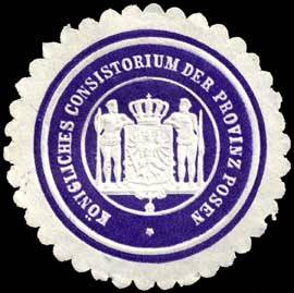 Sealing stamp Title: Königliches Consitorium der Provinz Posen Description: violett, weiß, geprägt Place: Posen size: 4 cm